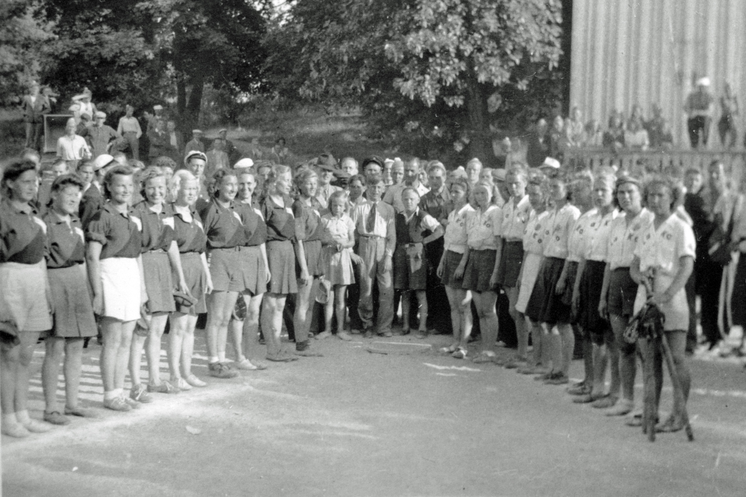 Kuva naisten pesäpallo-ottelusta Hukat - Lahden Koripalloilijat